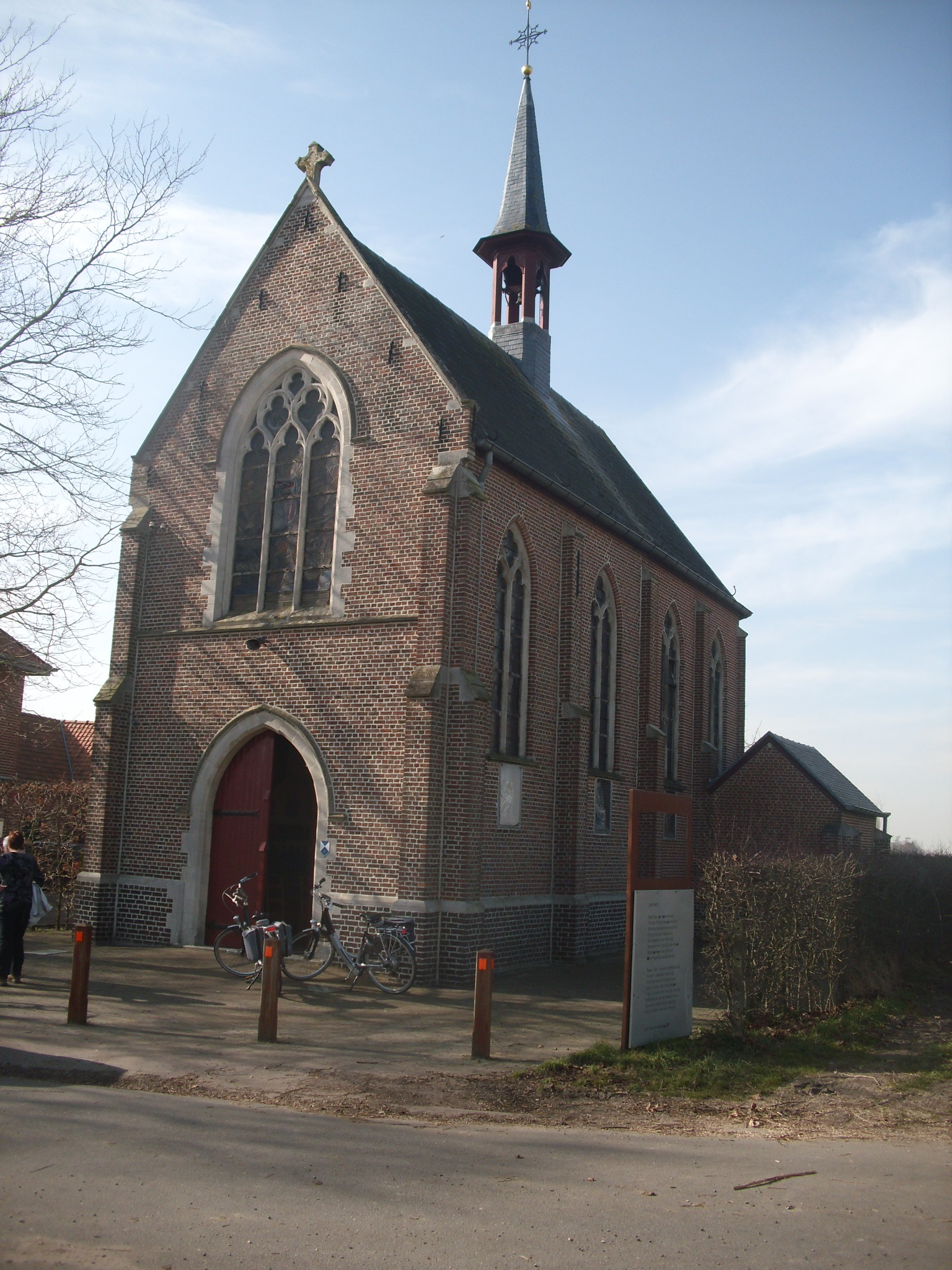 De Kleemkapel - Kleemstraat - Kaprijke - Oost-Vlaanderen - België